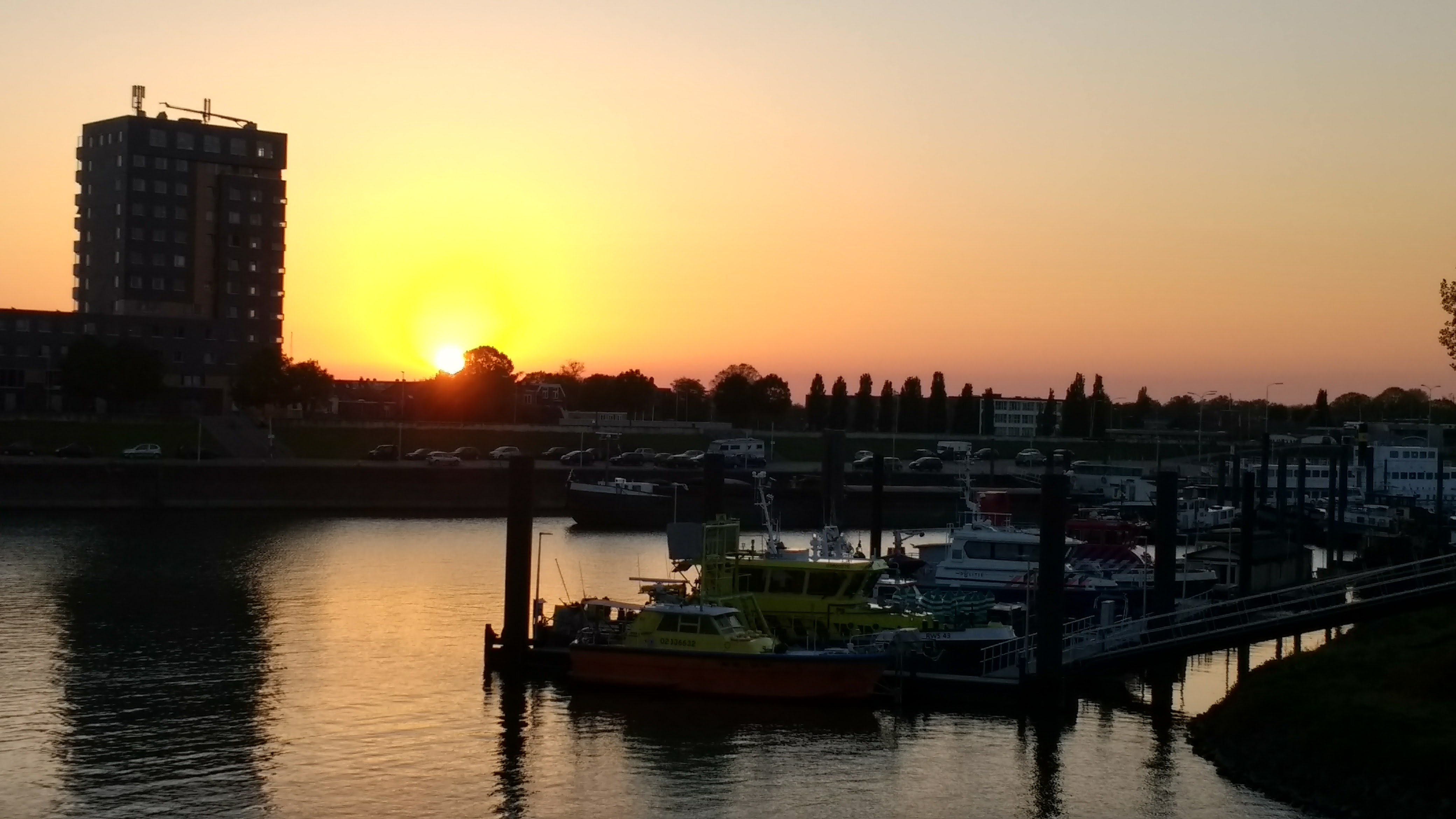 De Waalhaven in Nijmegen bij zonsondergang